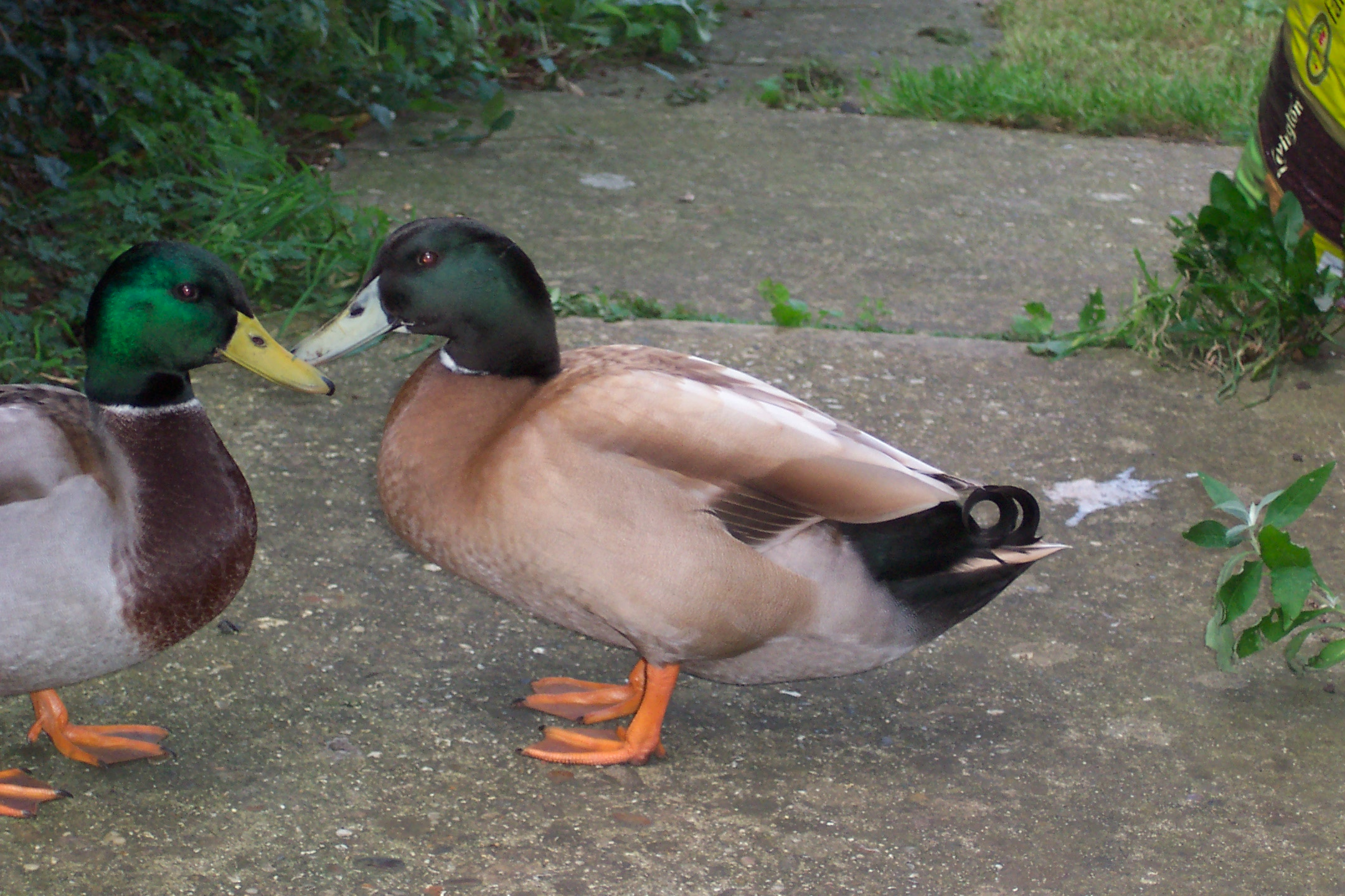 Male Khaki Campbell Duck